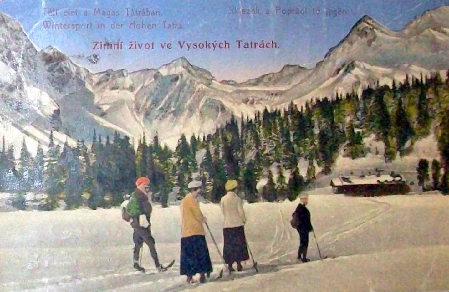 Pohľadnica Vysokých Tatier z roku 1922.